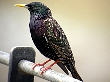 Photo prise au Parc des Aiguamolls en mai 2005 .